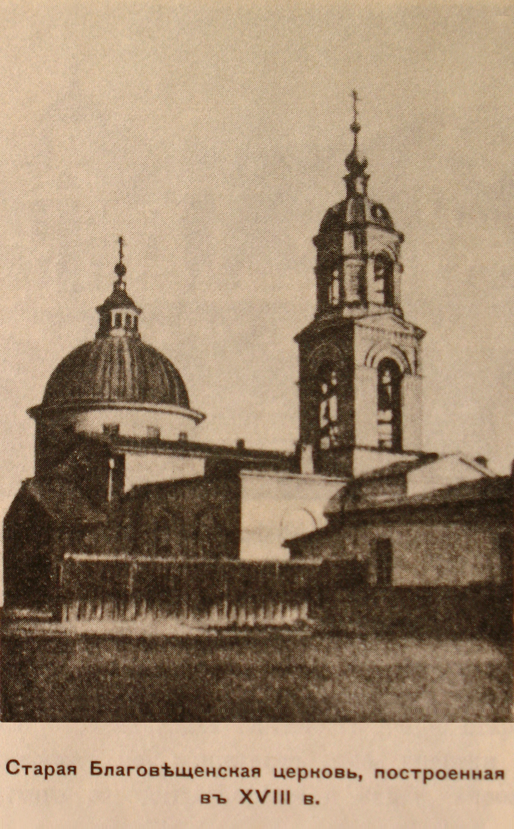 Первая каменная Благовещенская церковь г. Харькова, 1844-1846 photo. На её месте построен Благовещенский собор.